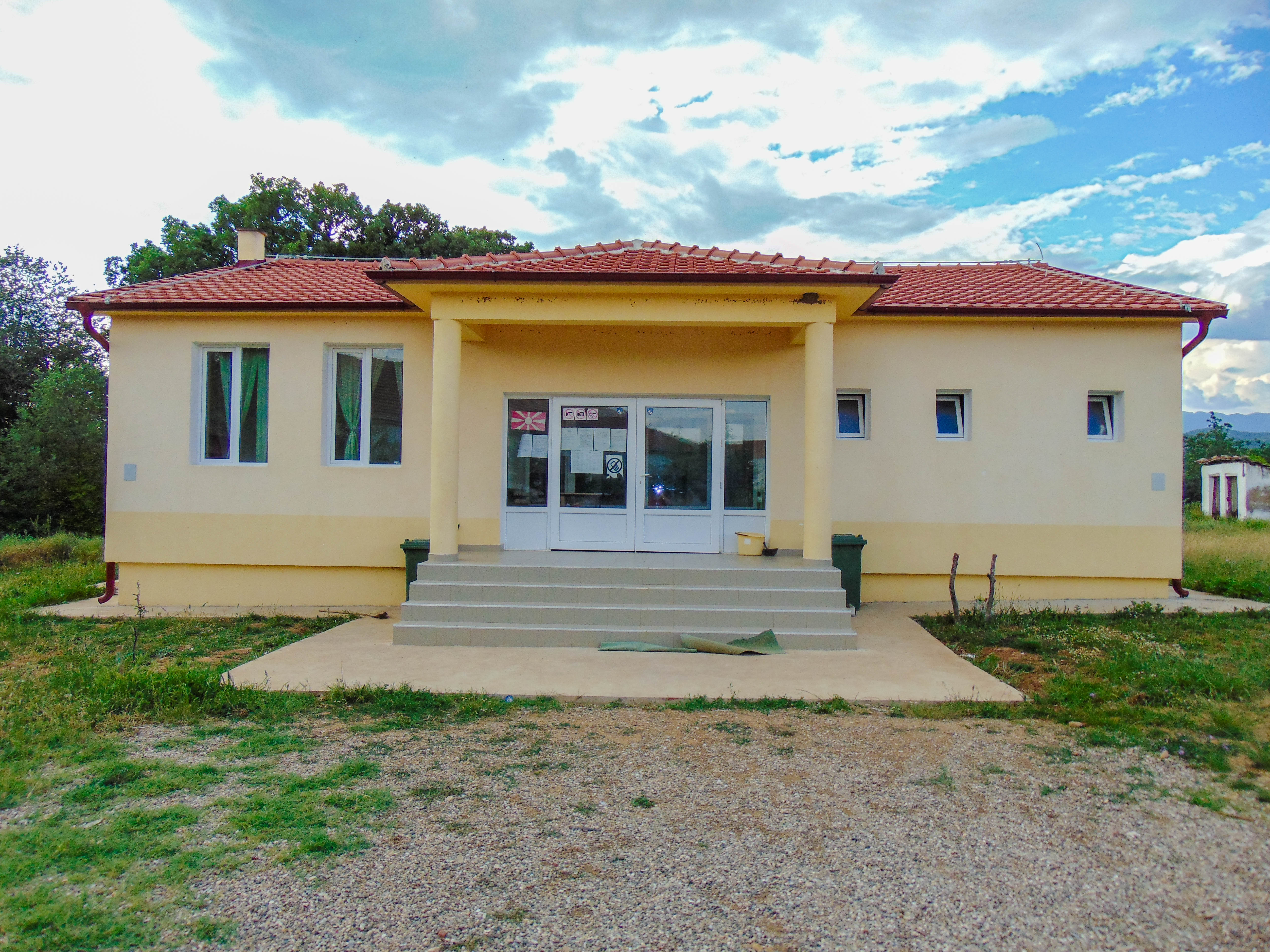 ОУ „Орце Николов“ – Покрајчево